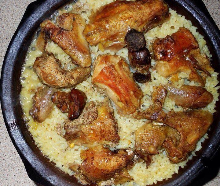 Ushqim tradicional ne krahinen e Hasit